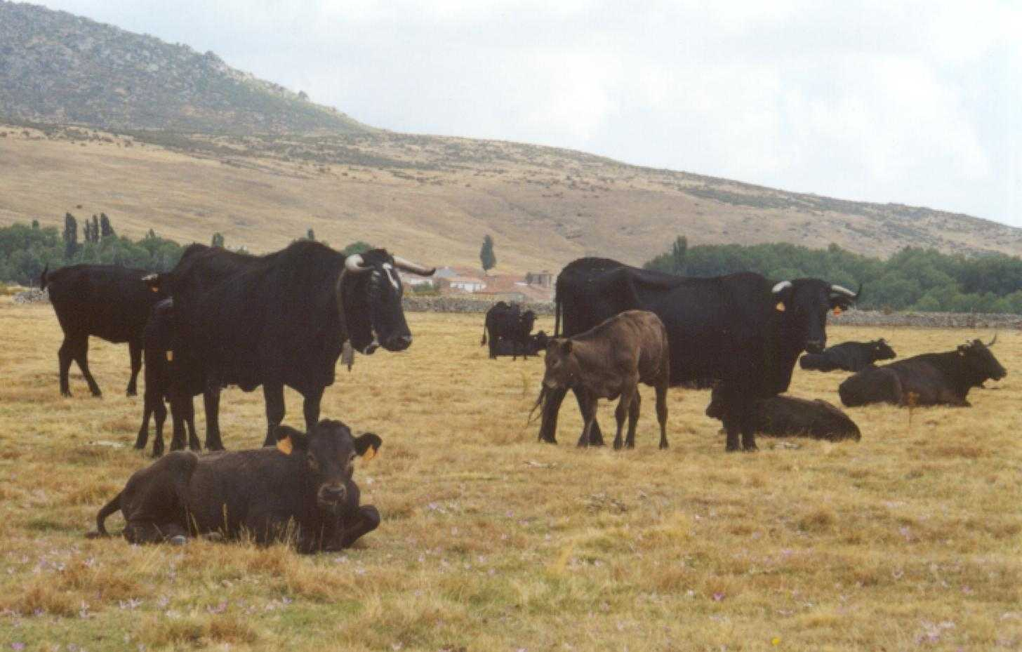 Ganado bovino pastando en la falda meridional de La Serrota (Garganta del Villar; Ávila; España). Autor: C3PO